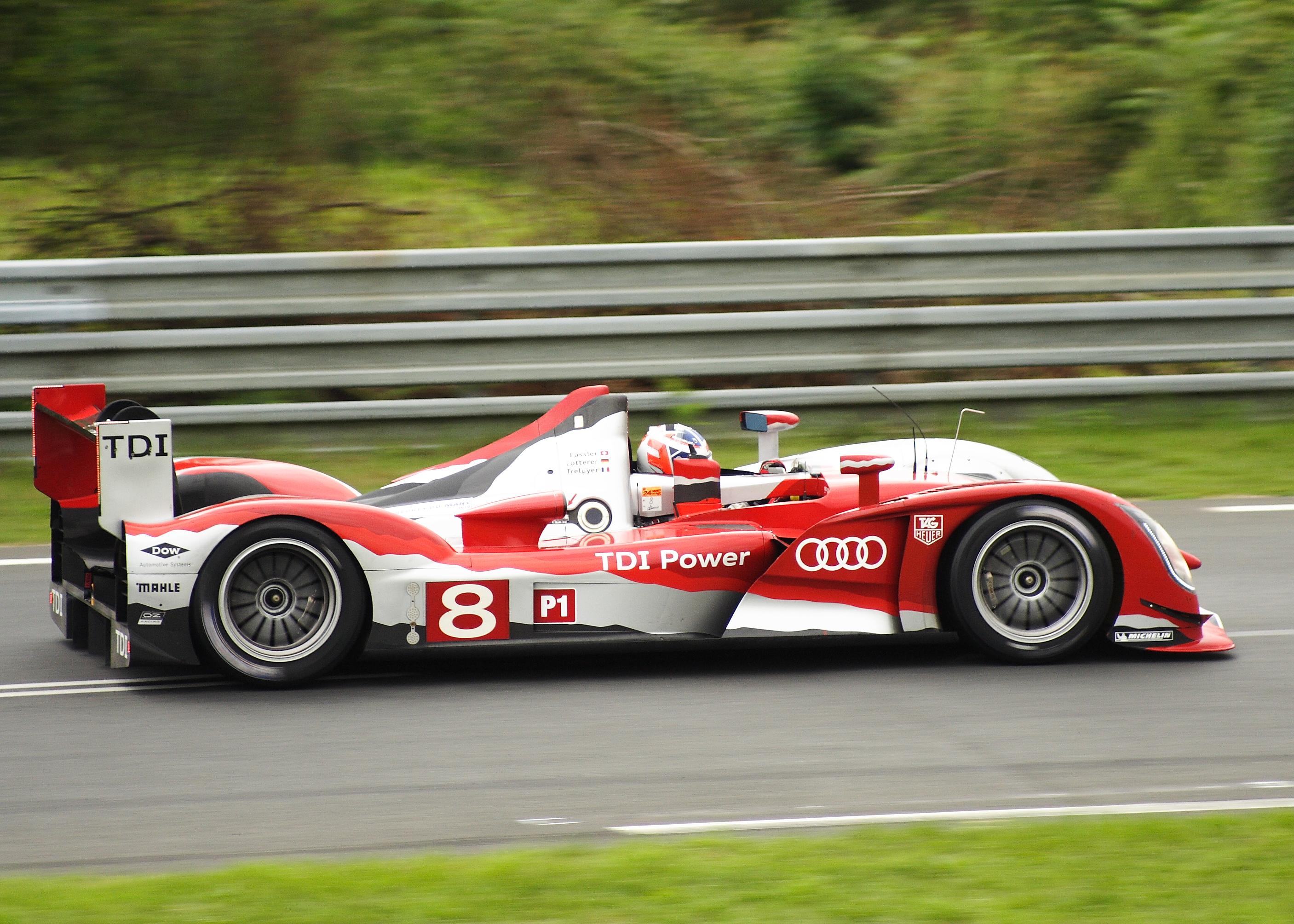 Le Mans 24 Hour Race 2010: Audi